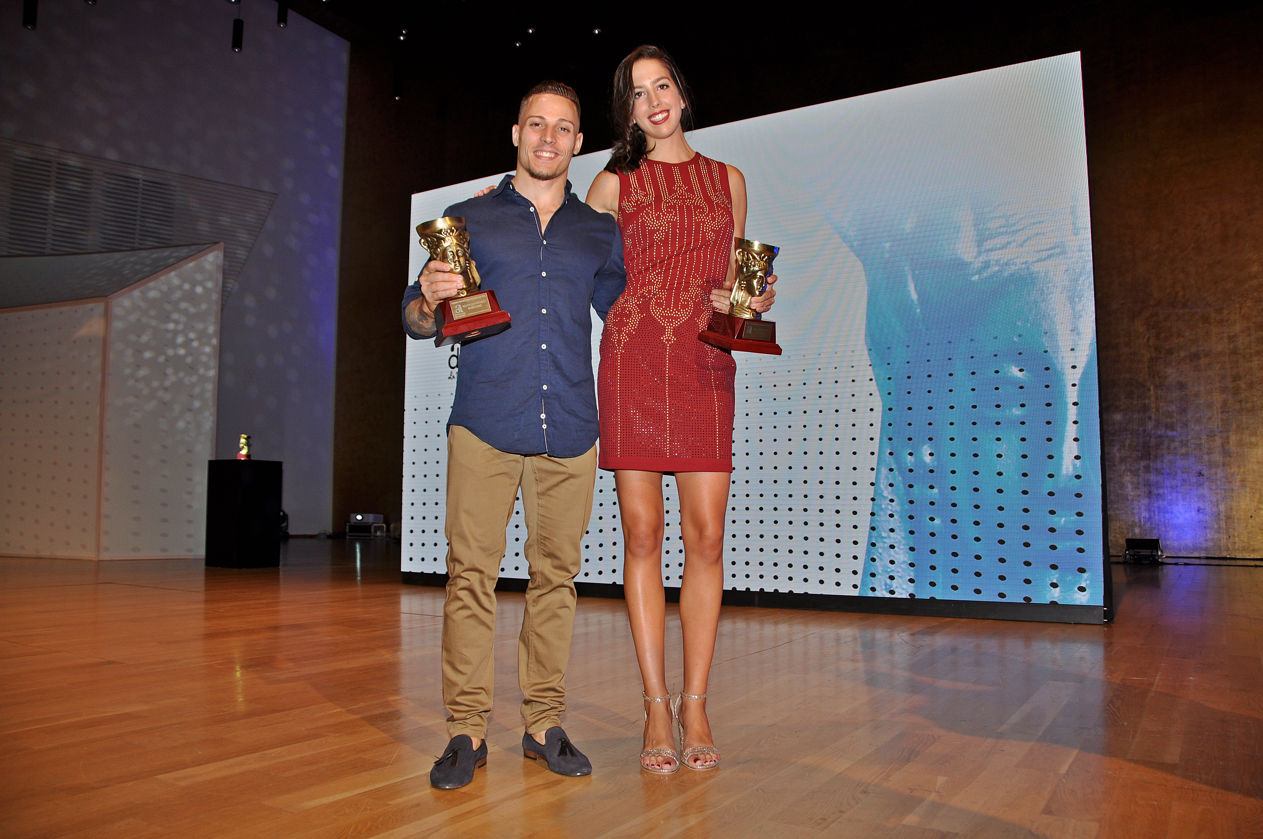 Néstor Abad y Alejandra Quereda en la XXIV Gala Provincial del Deporte de Alicante celebrada el 22 de septiembre de 2017, donde recibieron el premio a mejor deportista masculino y femenina de 2016.